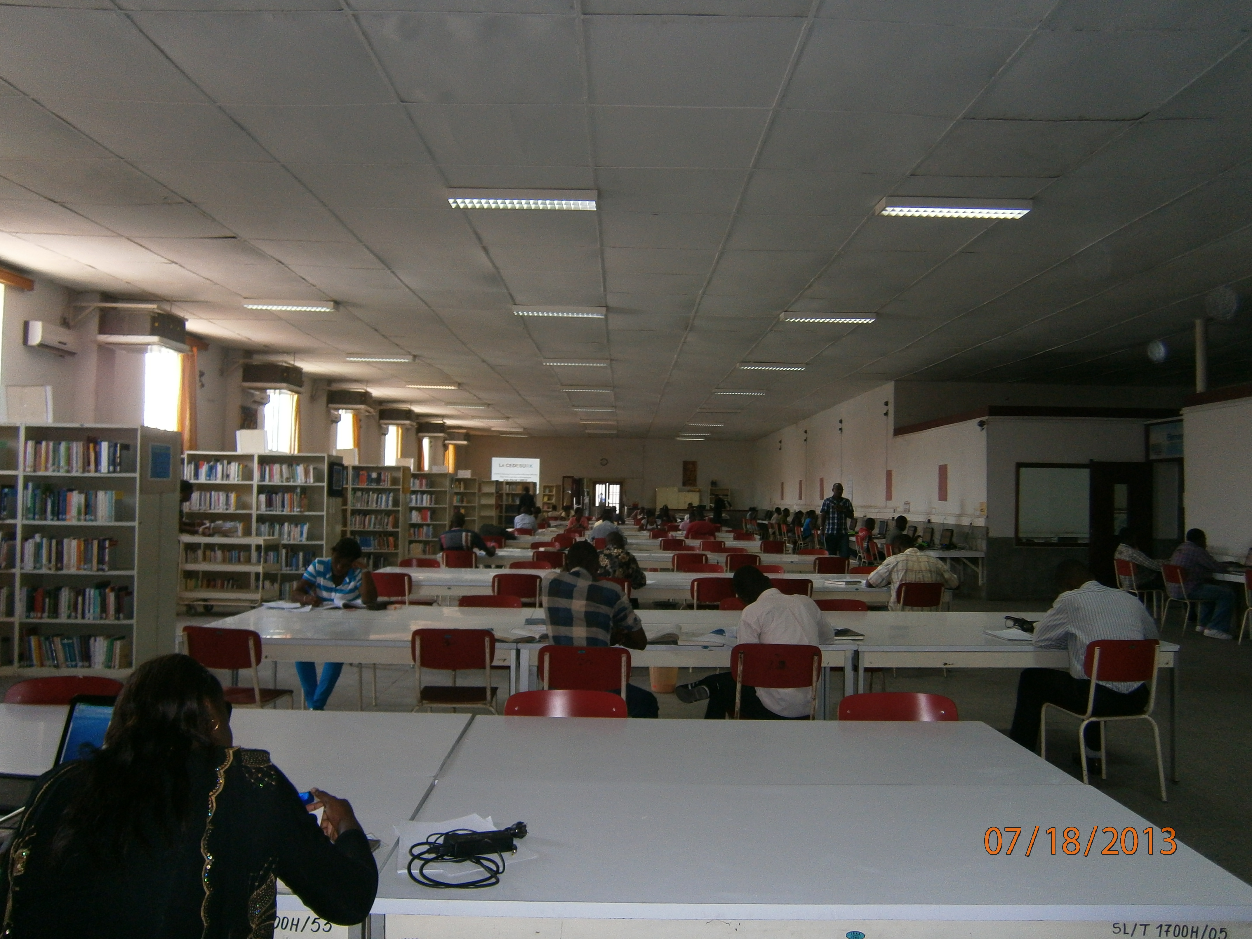 formation et porte ouverte à l'AUF au sein de l'enceinte du CEDESURK en mars 2013